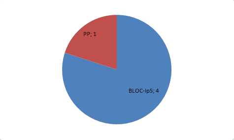 Número de concejales de las elecciones locales de 2007 en Segart